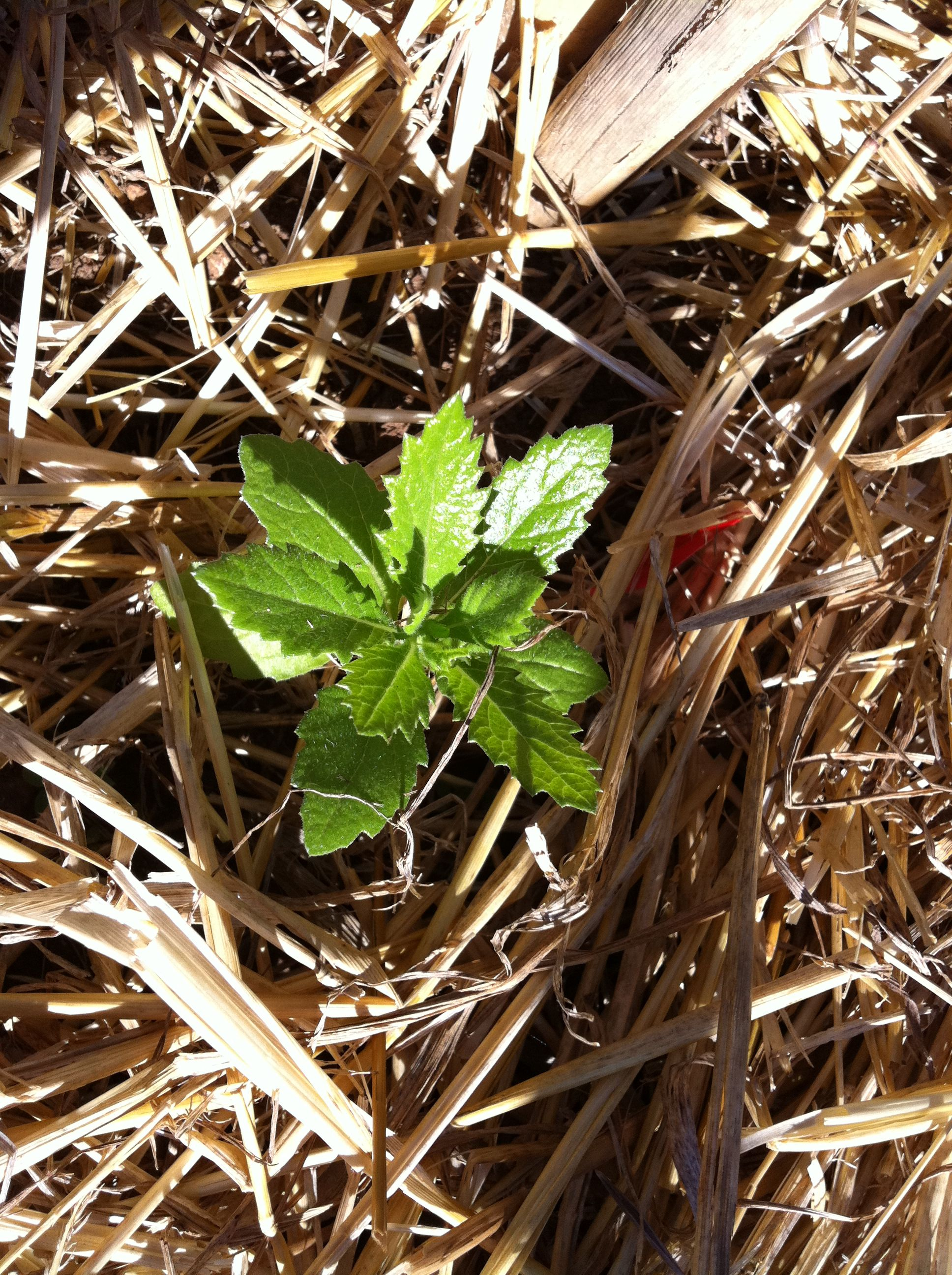 Plàntula de Senecio pterohorus